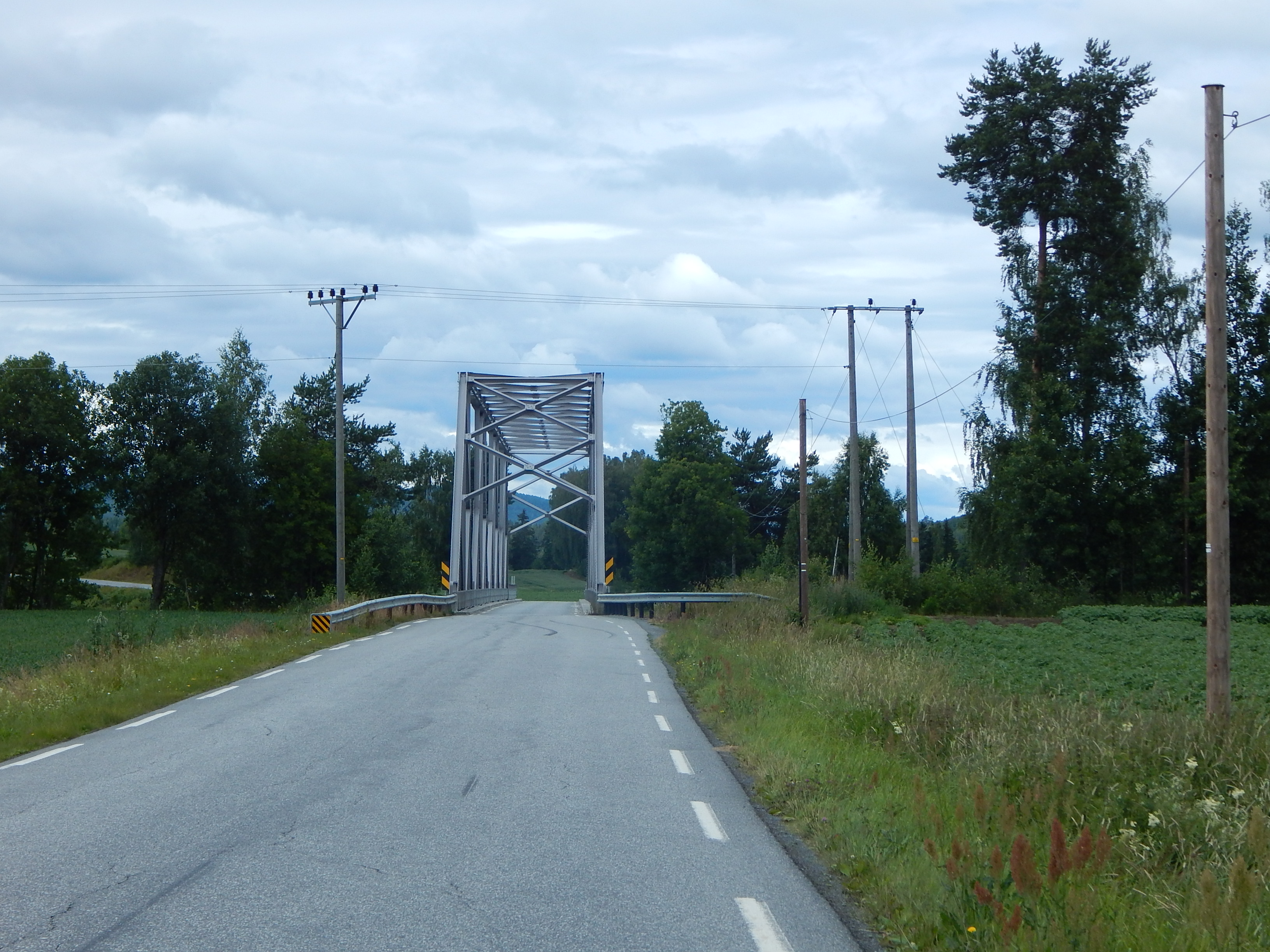 Busundveien (fylkesvei 162) over Busund bru